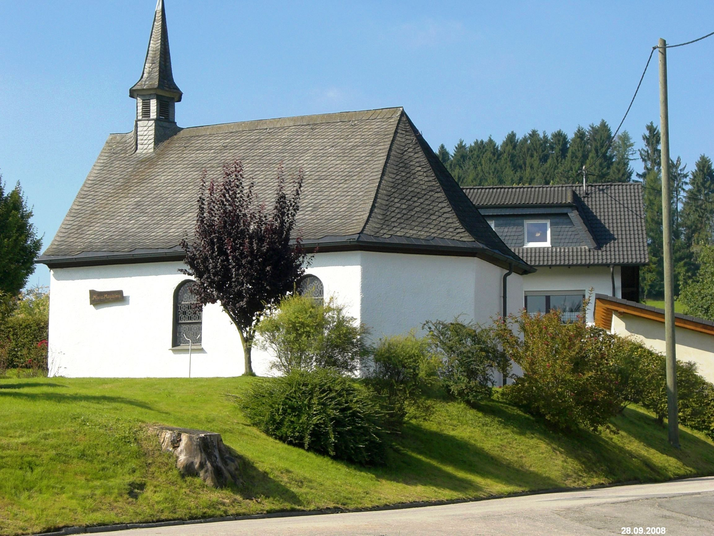 Kapelle Maria Magdalena in der Dorfmitte von Altenvalbert